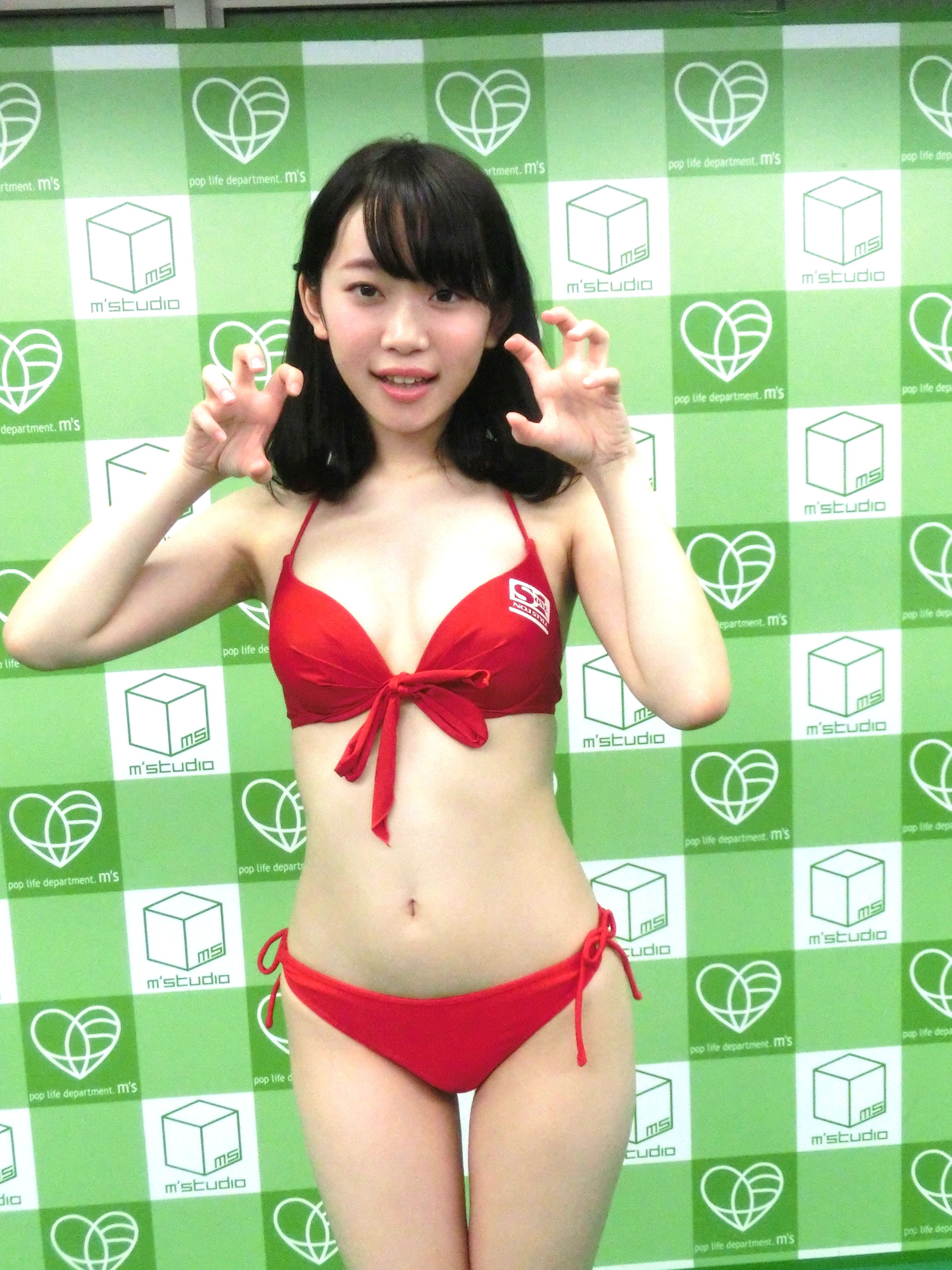 架乃ゆら（2017年11月、東京・秋葉原で撮影）